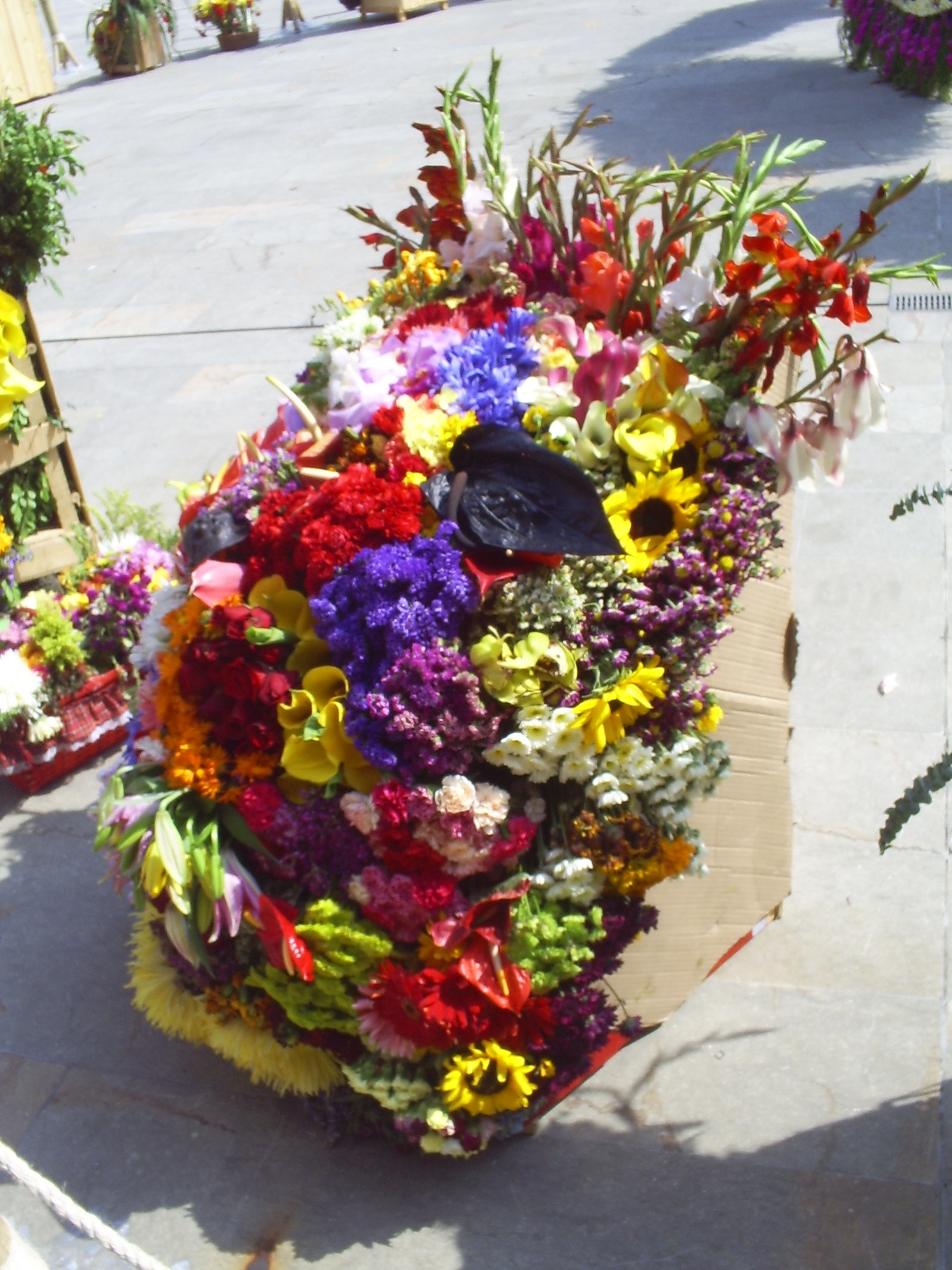 Desfile de Silleteros 2007, silletas expuestas después del desfile. Medellín, Colombia.